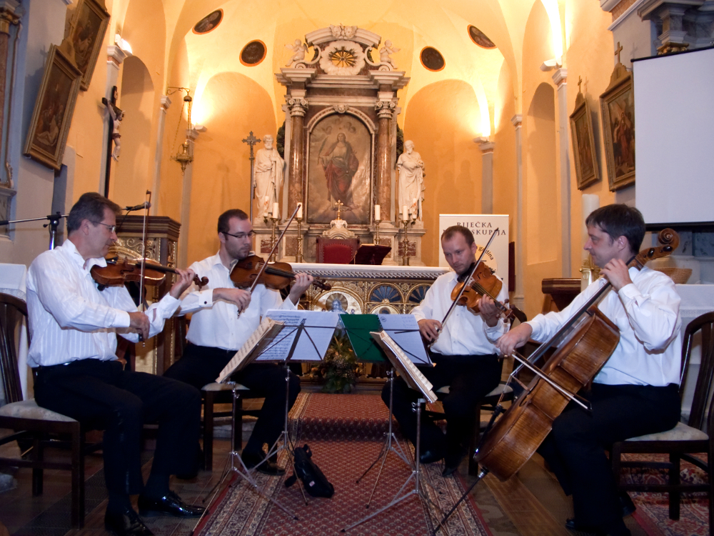 Zagrebački kvartet